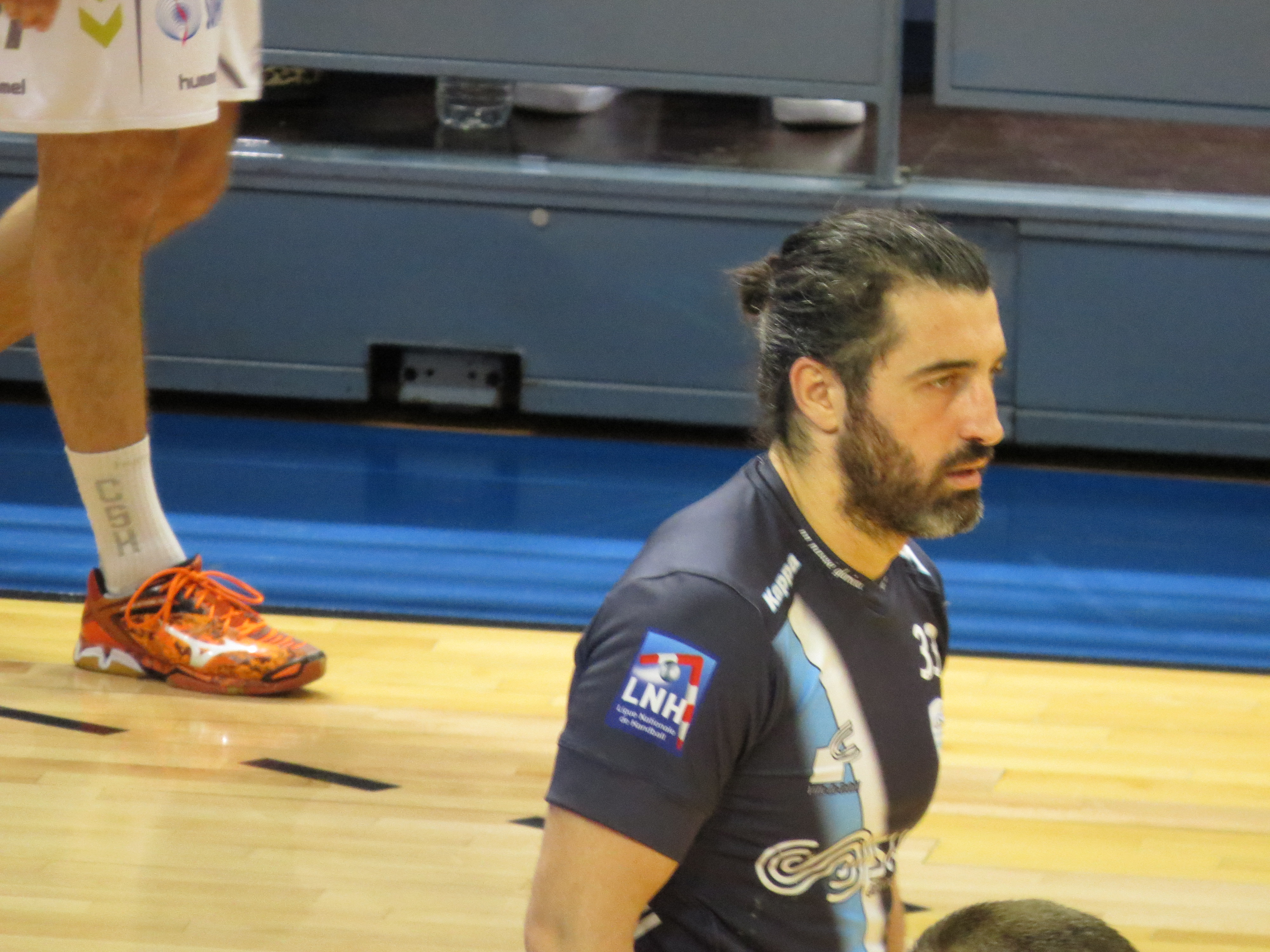 US Créteil vs Chambéry en LNH le 9 septembre 2015 33 : Mohamed Mokrani